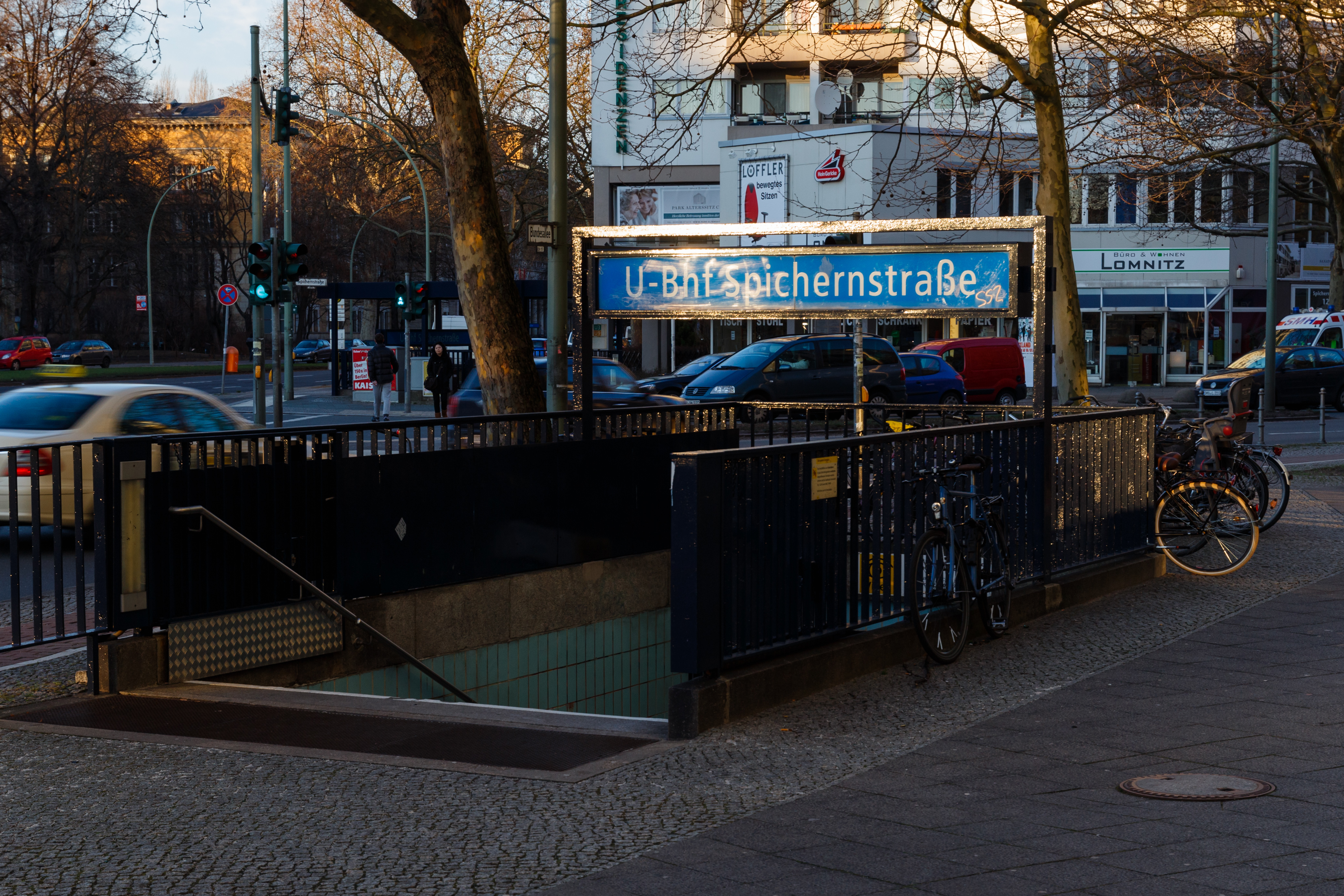 U-Bahnhof Spichernstraße